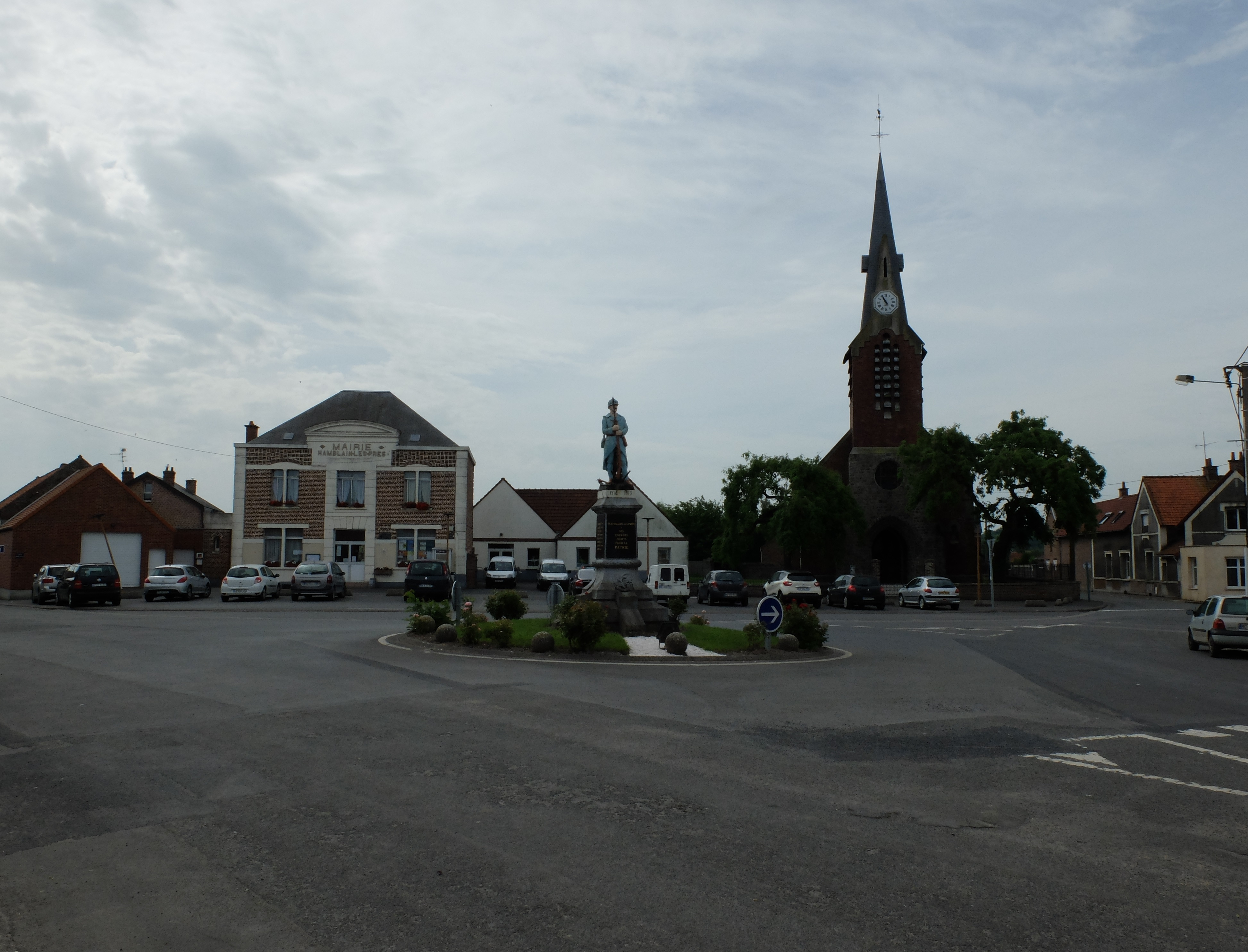 Vue du centre d'Hamblain-les-Prés : figurent sur l'image la mairie, le monument aux morts et l'église.